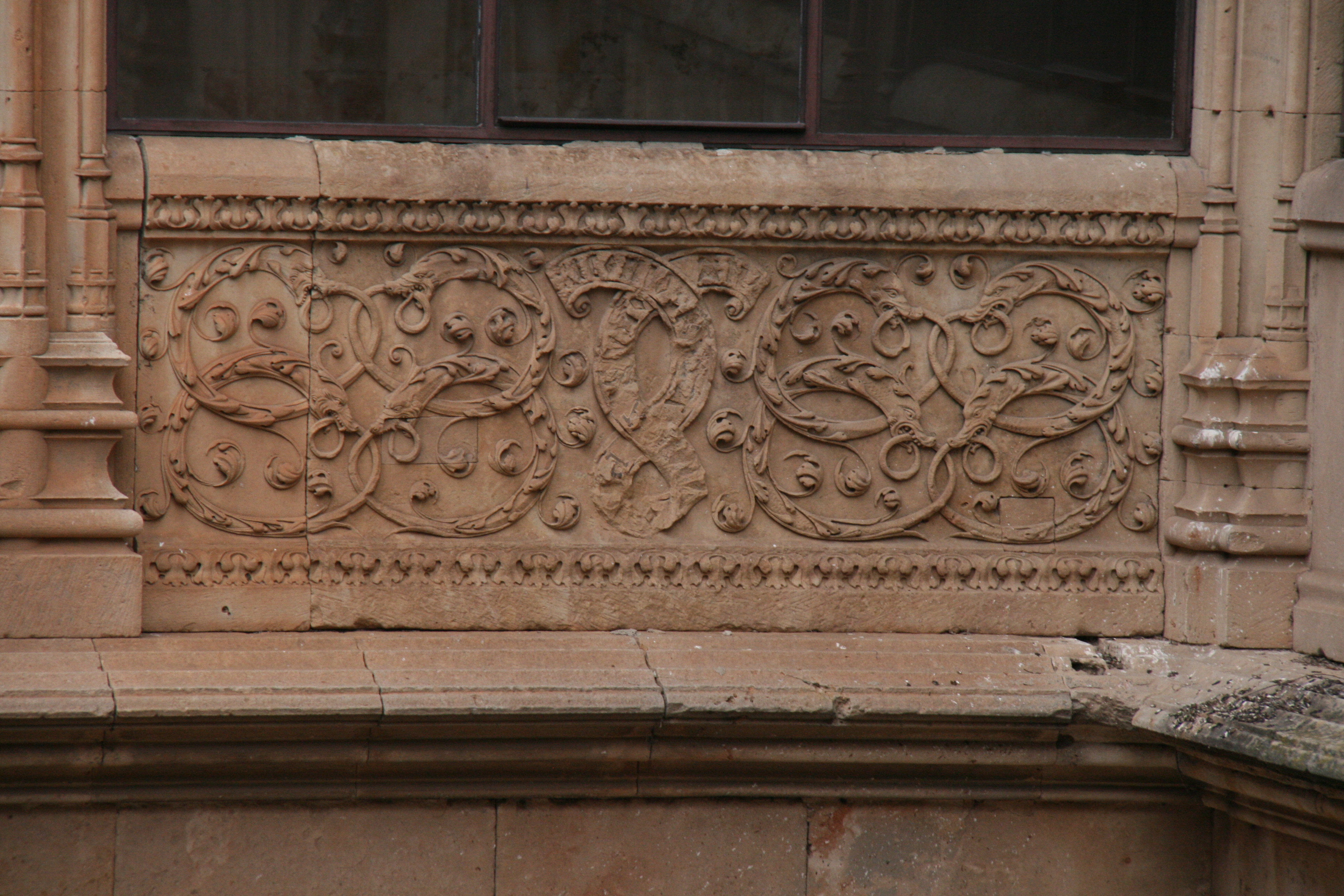 Septimo enigma